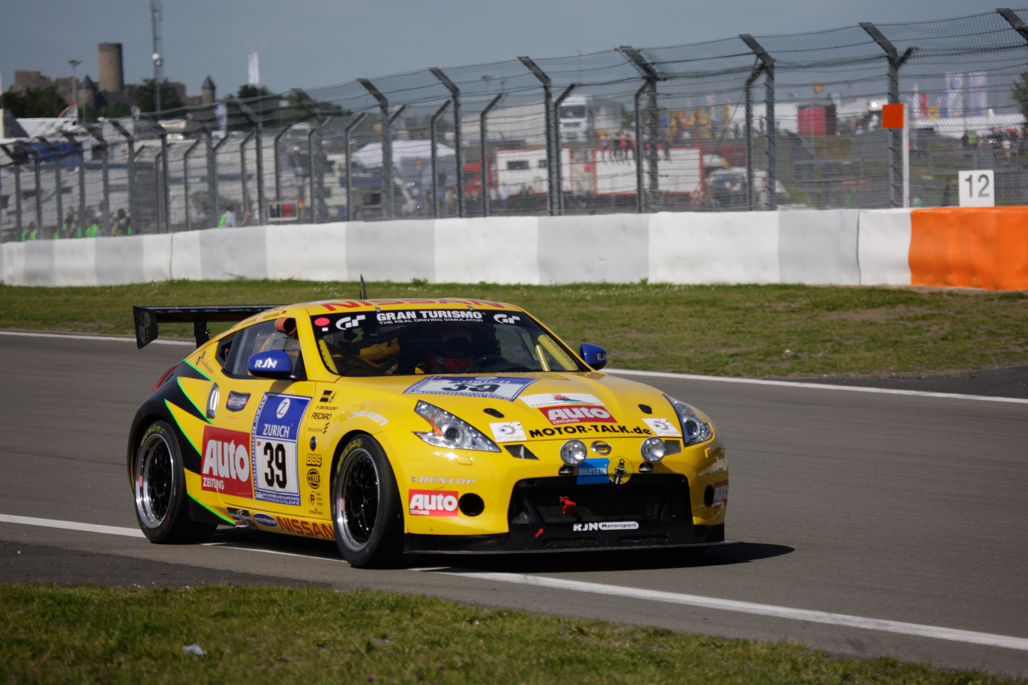 370z beim 24-Stunden Nürburgring Rennen 2009